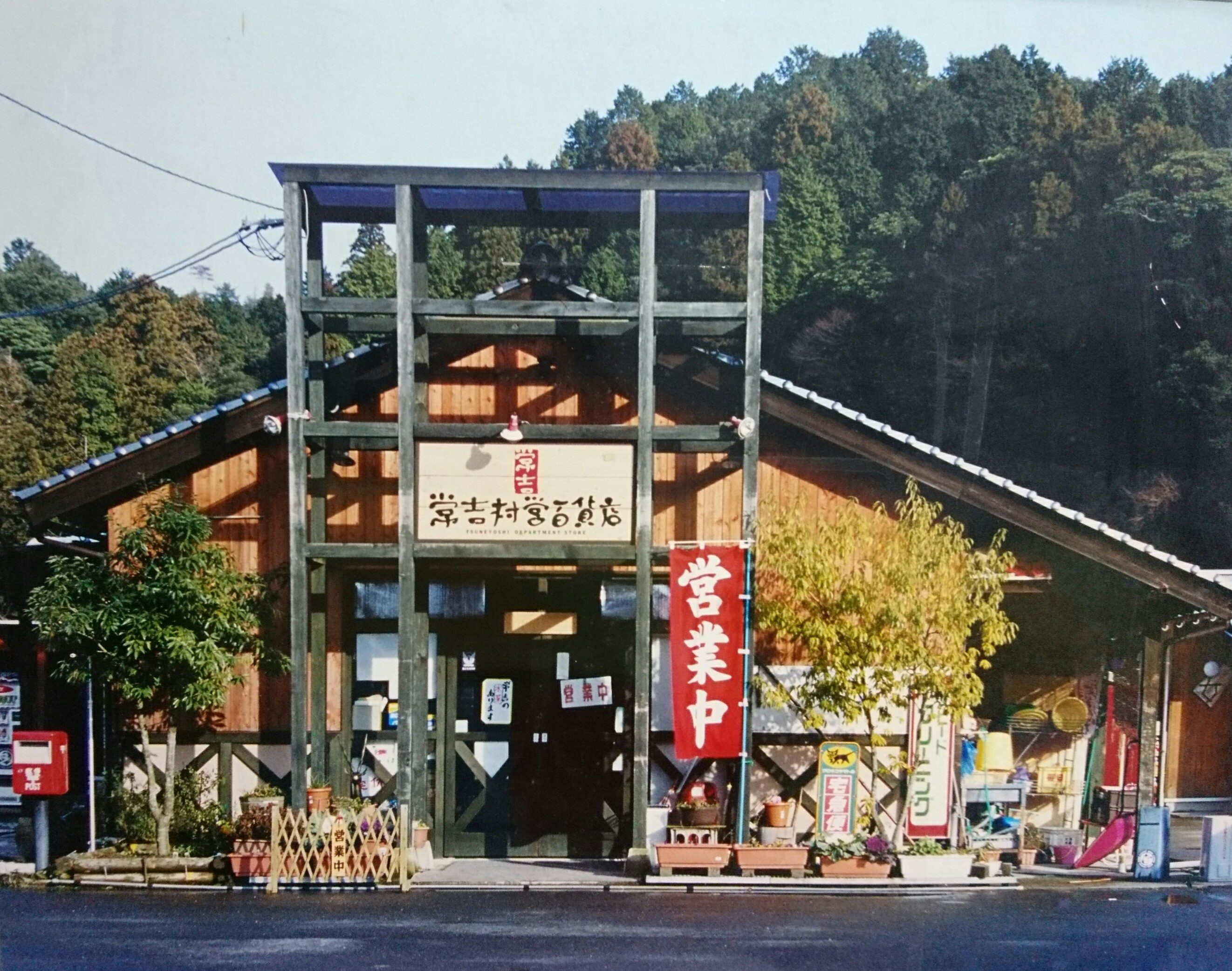 常吉村営百貨店外観